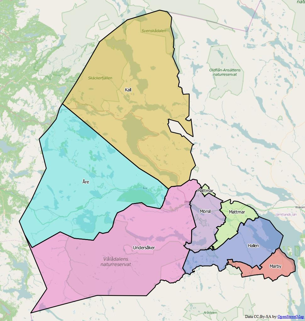 Distriktsindelningen i Åre kommun World file 308.31404601412214106 0 0 -308.31404601412214106 1314291.81113866763189435 9383847.35620521008968353